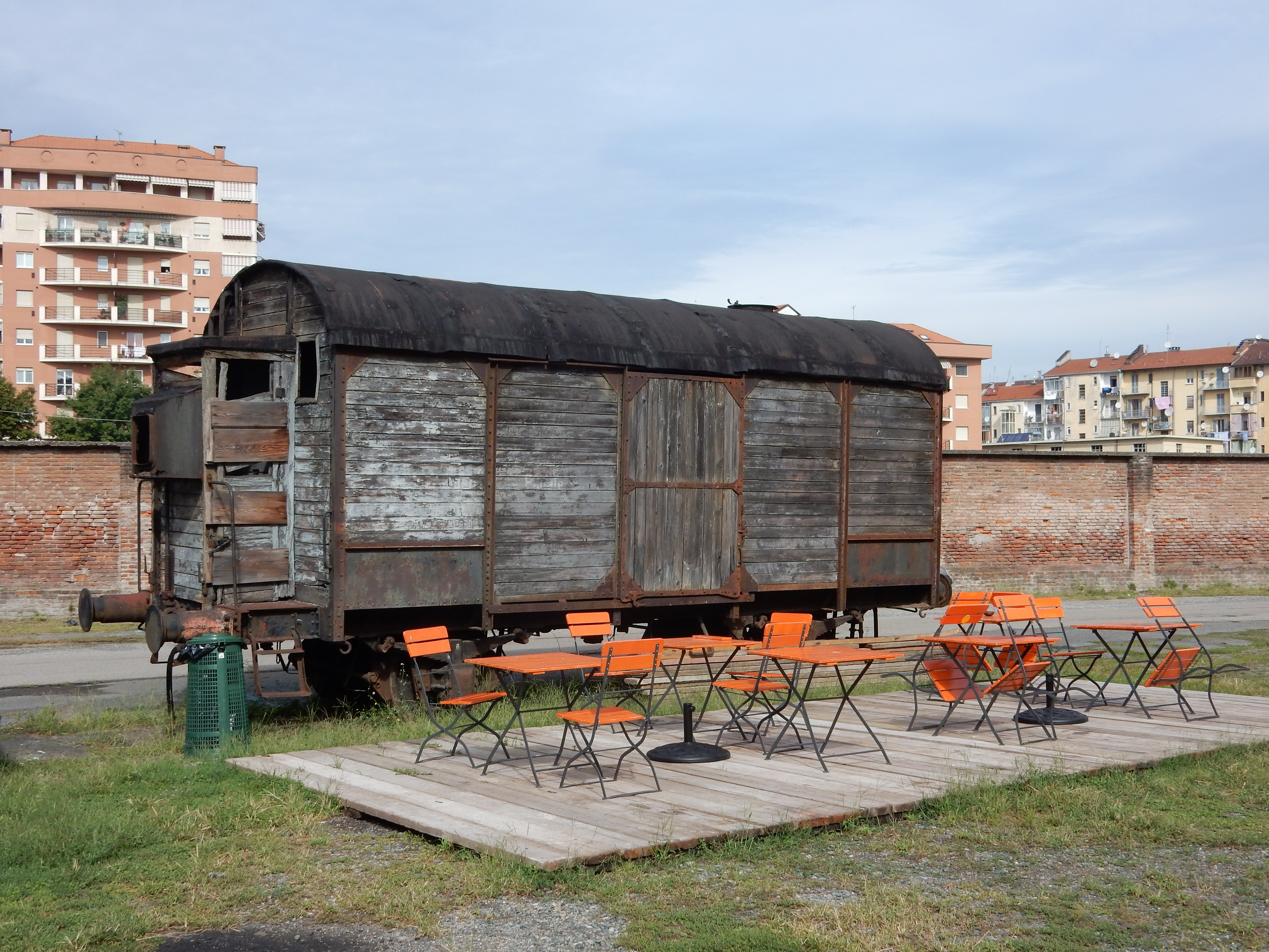 Birreria con riutilizzo vagone ferroviario